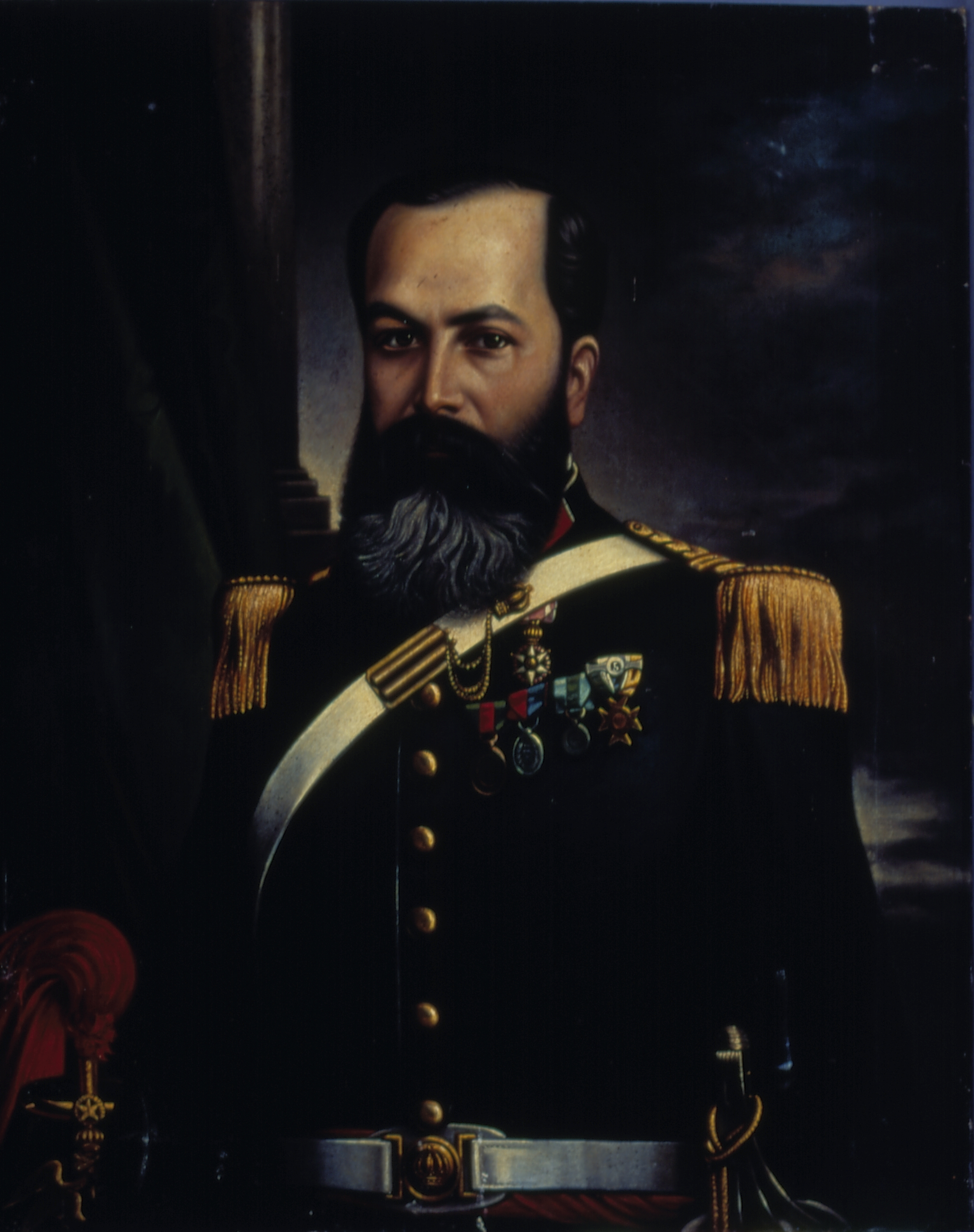 Obra que integra o acervo do Museu Paulista da USP.